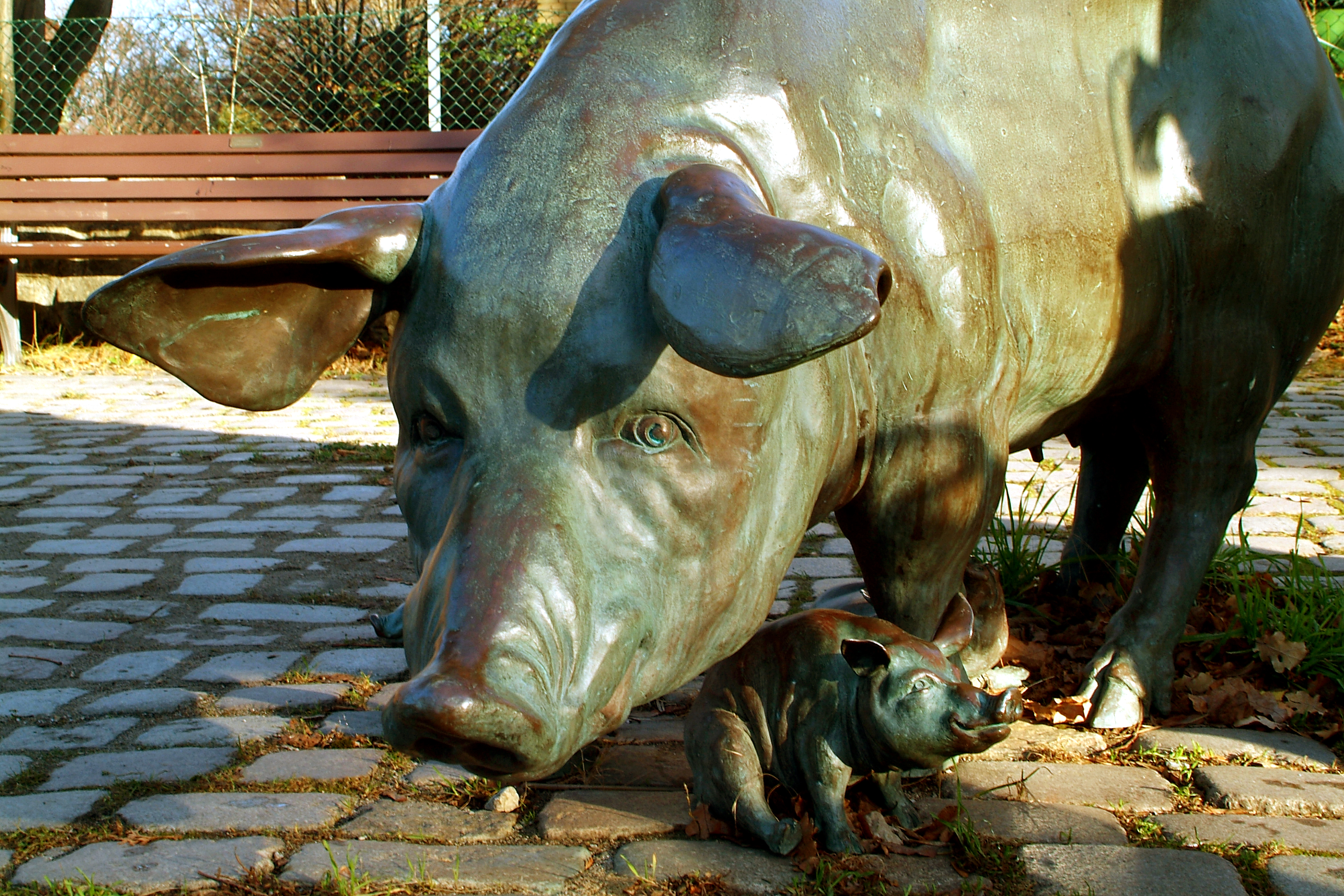 Dorfbrunnen in der Pinkenburger Straße, eine Sau mit Ferkel, Blick aus der Kinderperspektive